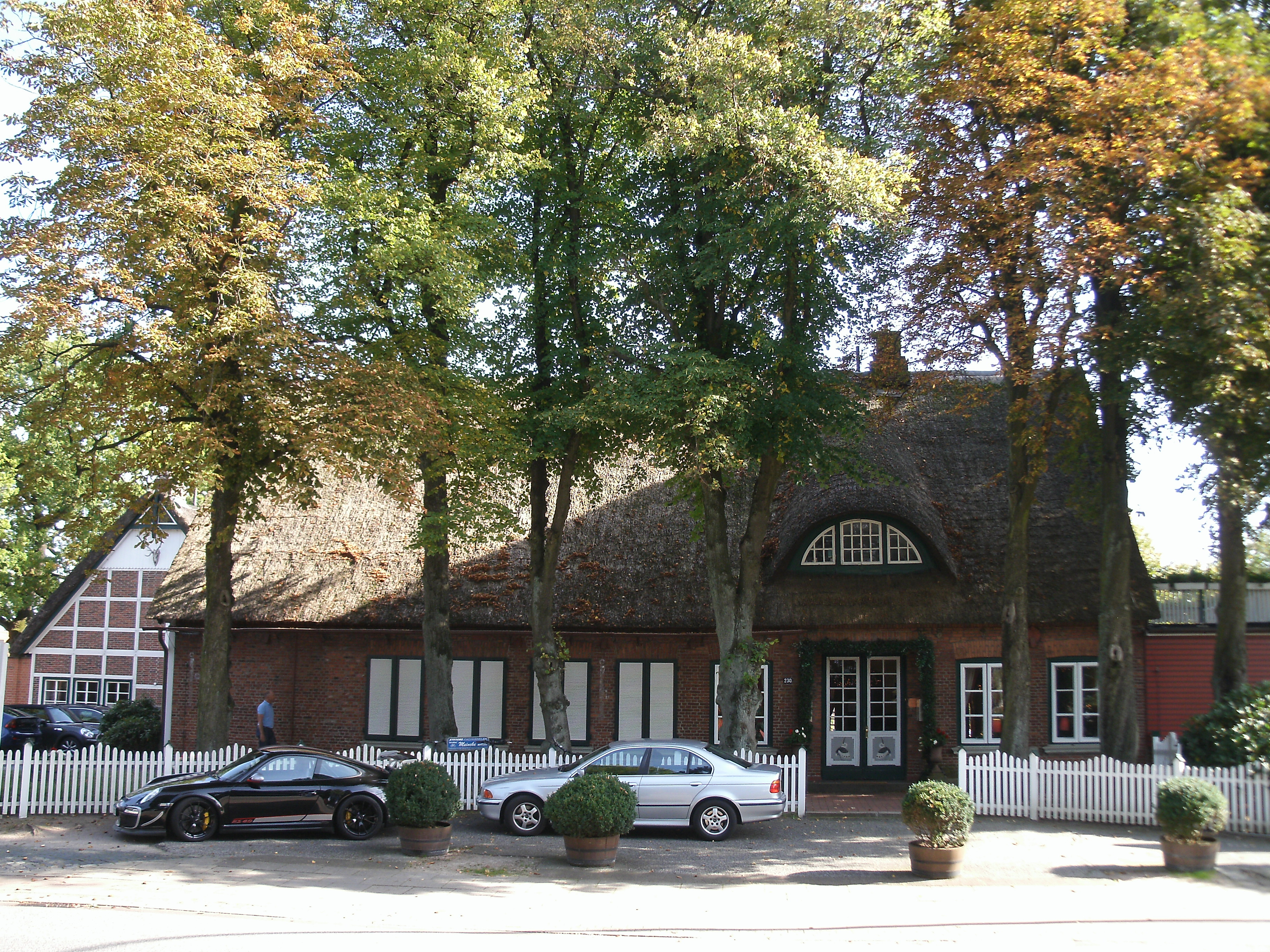 Baudenkmal reetgedecktes Bauernhaus Gesamtansicht This is a photograph of an architectural monument.